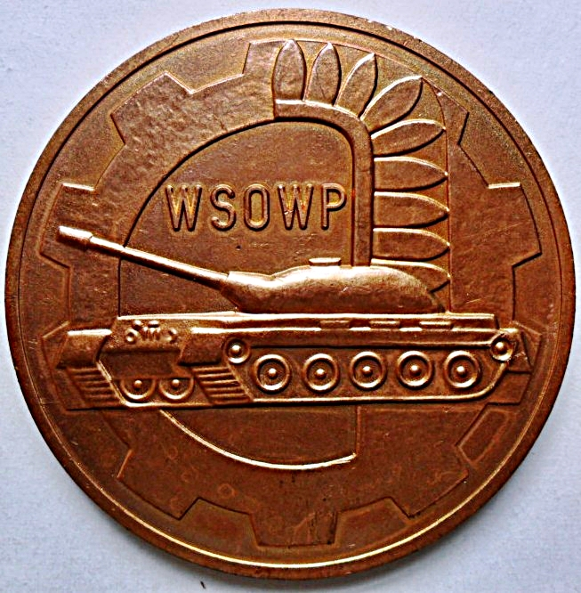 Medal pamiątkowy WSOWP